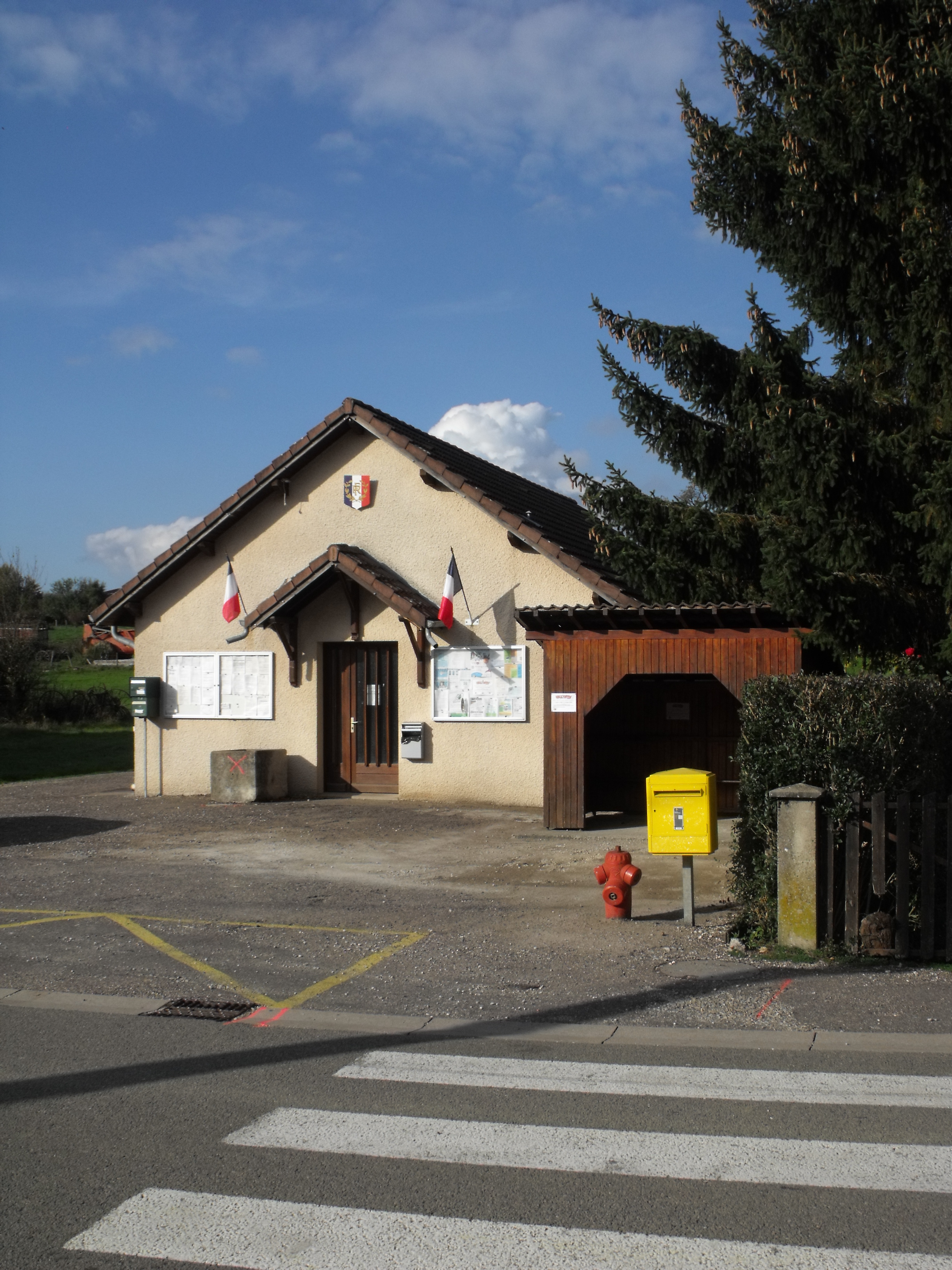 Mairie de l'Ecouvotte, Doubs, France